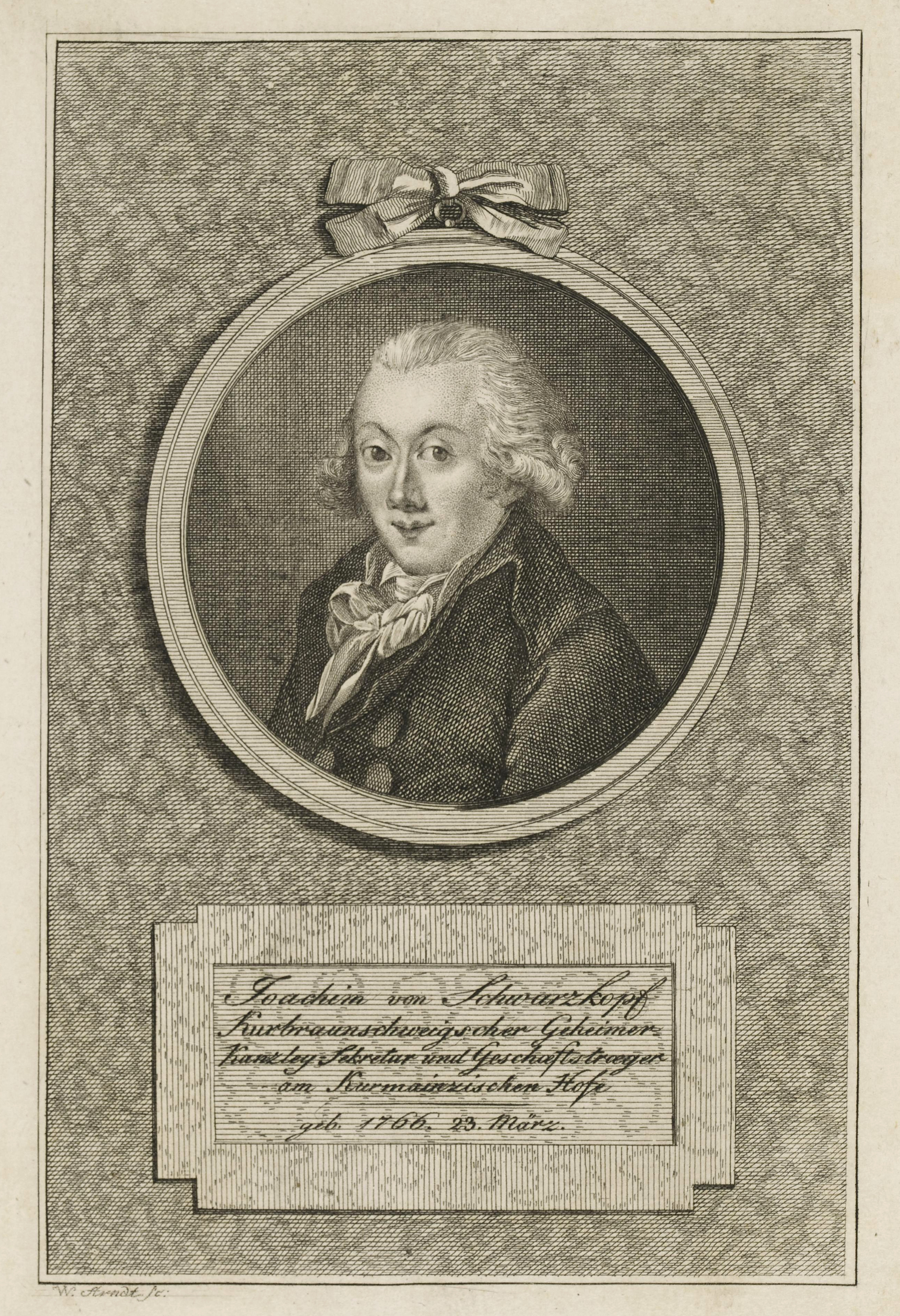 Joachim (1792: von) Schwarzkopf (1766-1806), Diplomat, Staatswissenschaftler, Publizistikwissenschaftler; Porträtstich von Wilhelm Arndt (*1750), Stecher 1792/1813.